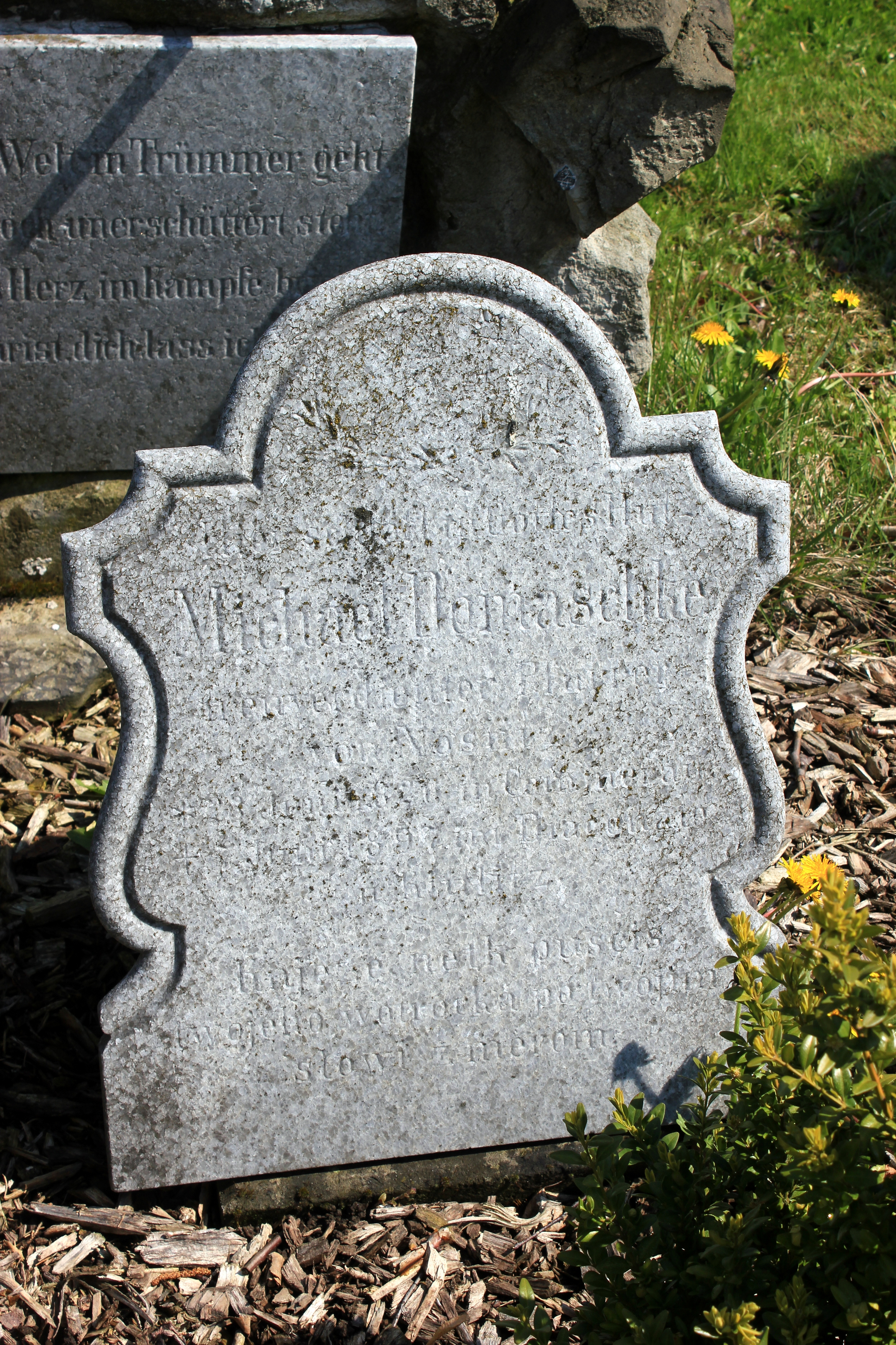 Hornjoserbsce: Dwurěčny narowny kamjeń fararja Michał Domaški na Ketličanskim kěrchowje.